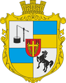 Герб с. Світлодолинське (Саратський район)